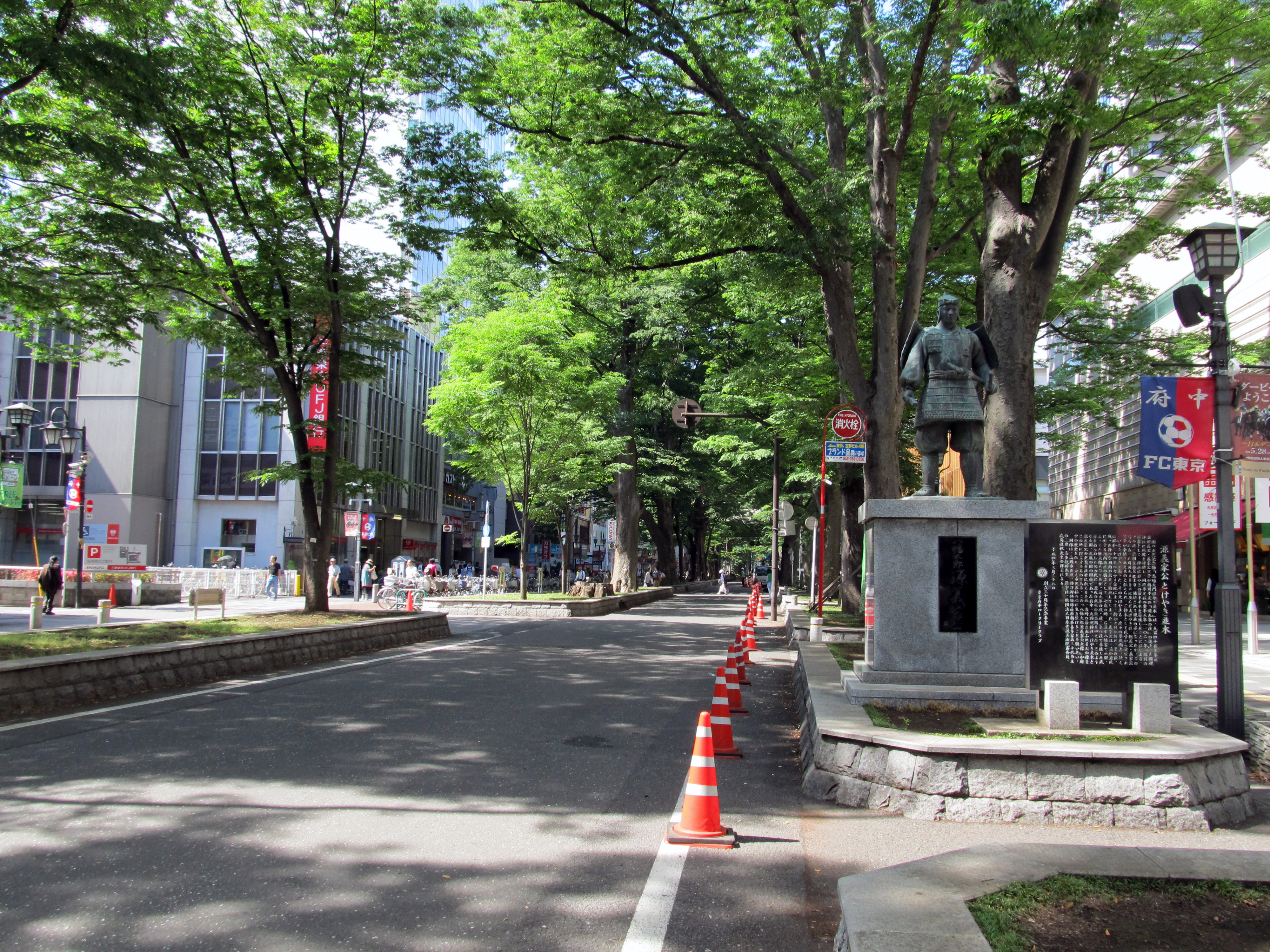 けやき並木通り。府中市のメインストリート。